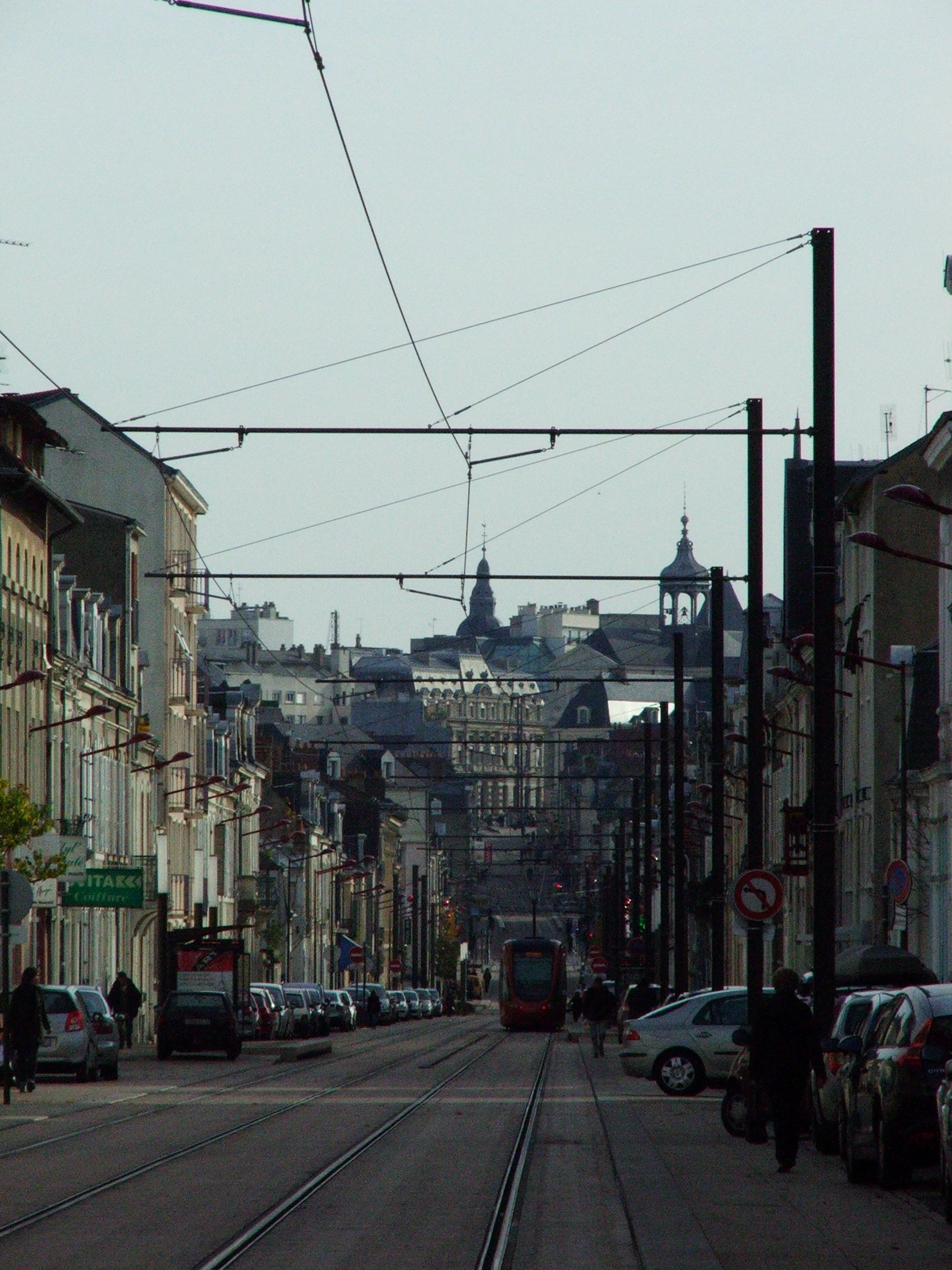 L'avenue Gambetta donnant vers le centre-ville du Mans.